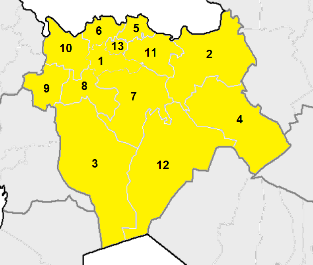 Административная карта Актюбинской области Казахстана